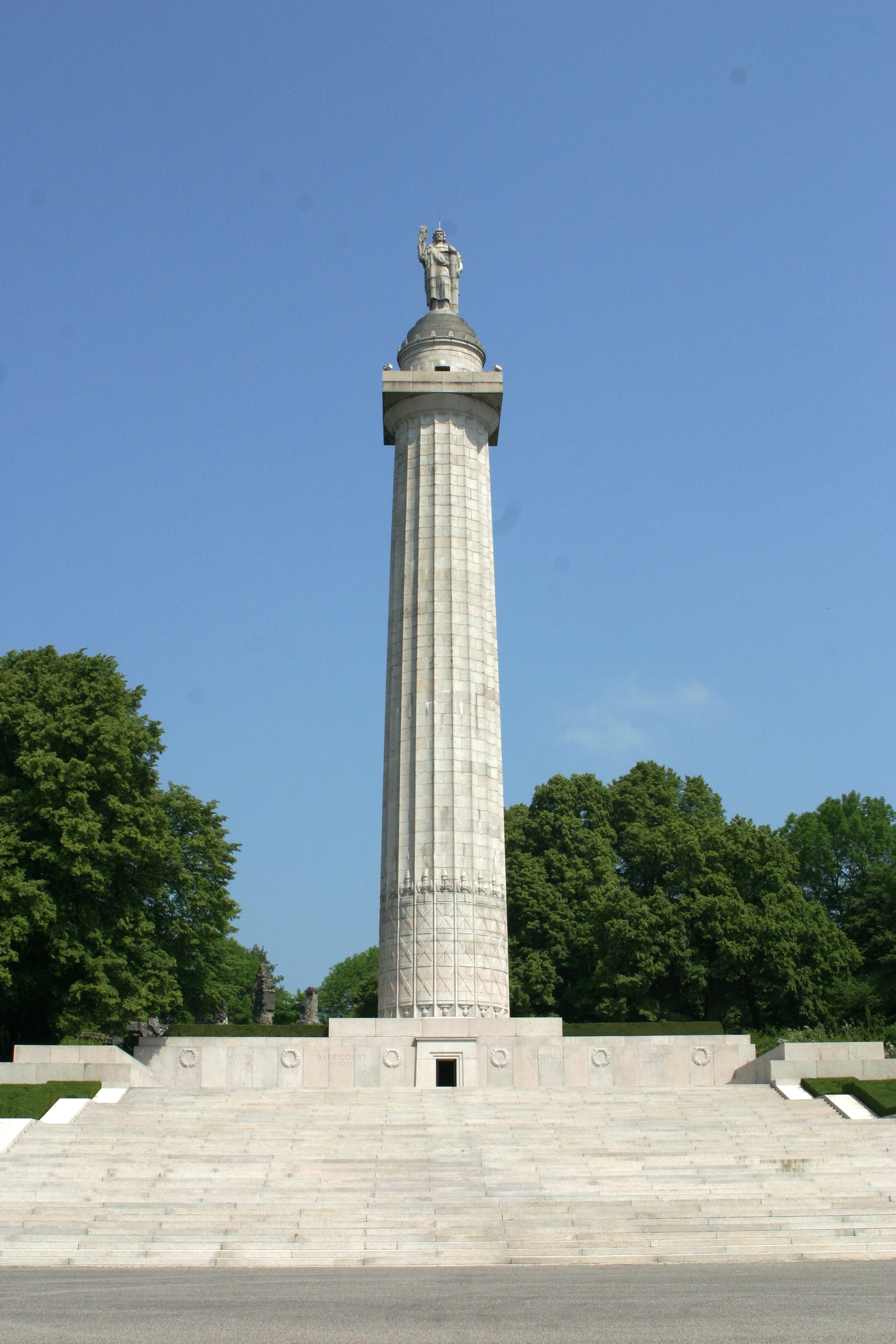 Amerikanescht Monument um Montaucon